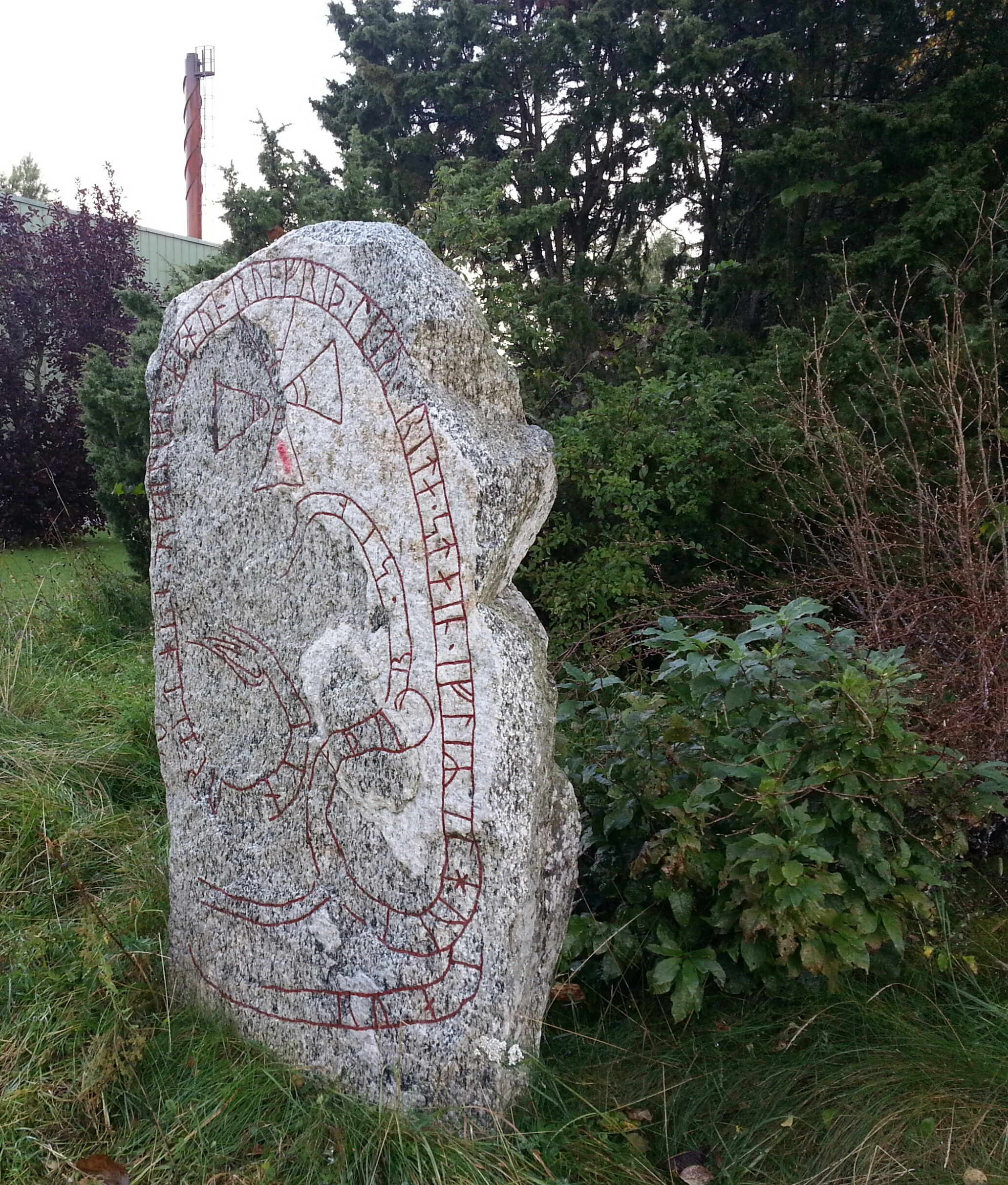 Runstenen U 1022 vid infarten till Ärentuna skola i Storvreta